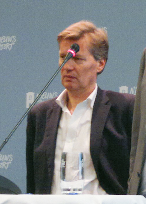 Frank Poorthuis (HP De Tijd) verslag